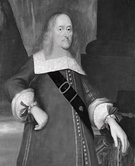 Joachim Ernst I af Slesvig-Holsten-Sønderborg-Pløn, Gripsholm Slot, Sverige